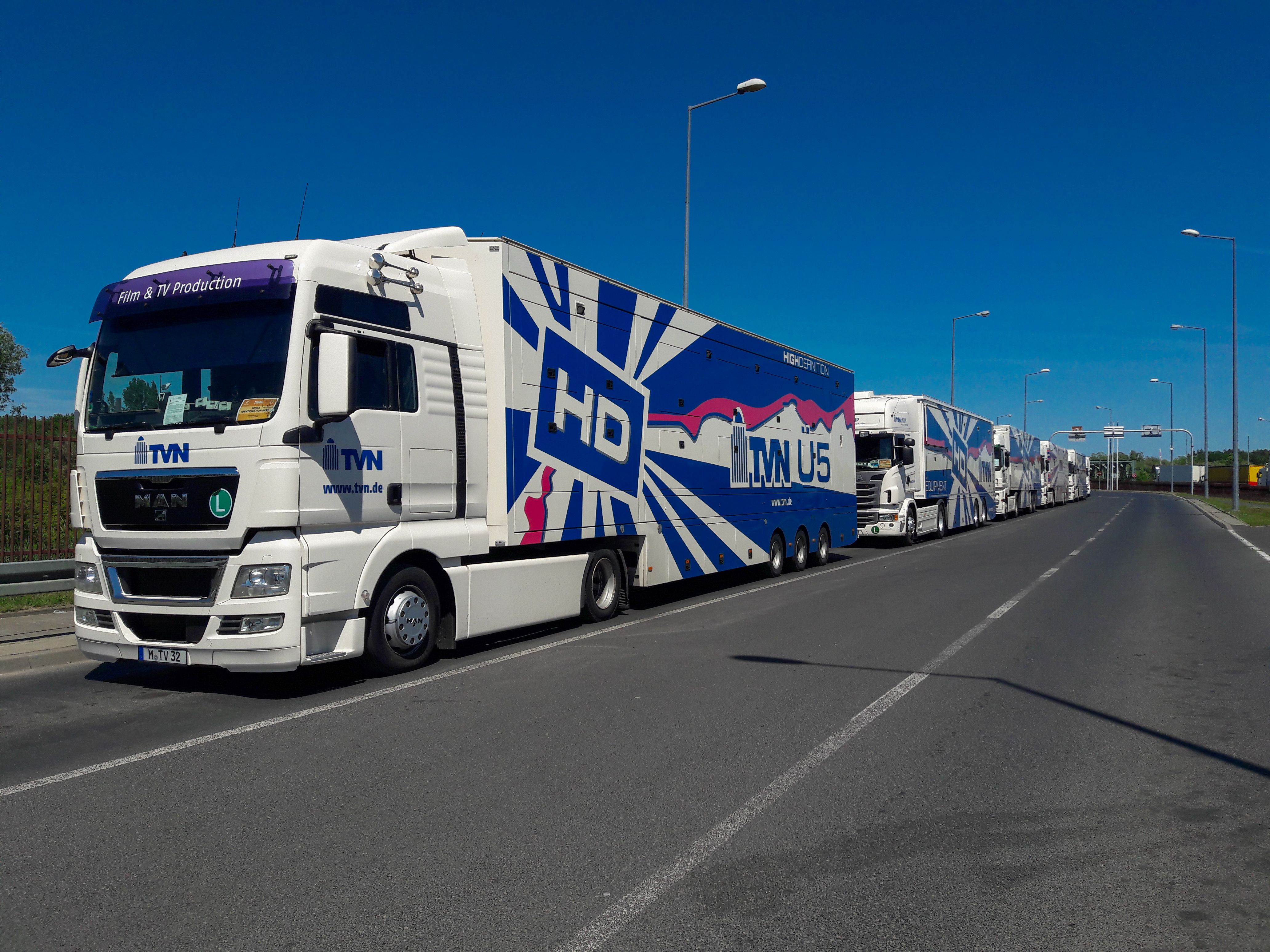 Die Übertragungswagenflotte der TVN Group auf einer Raststätte in Deutschland.